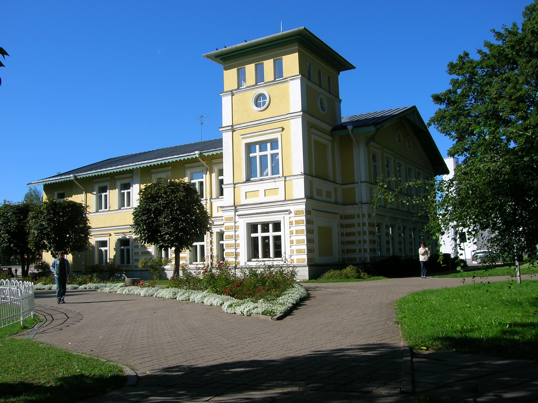 Valga KRK 1